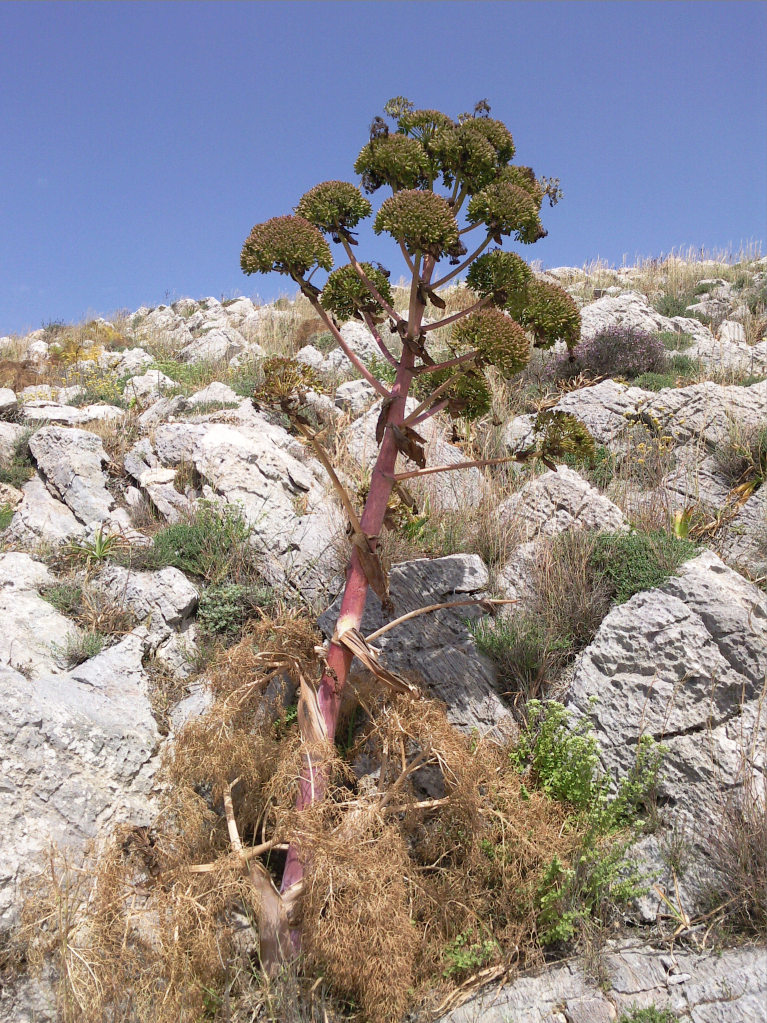 Férule commune, Santorin